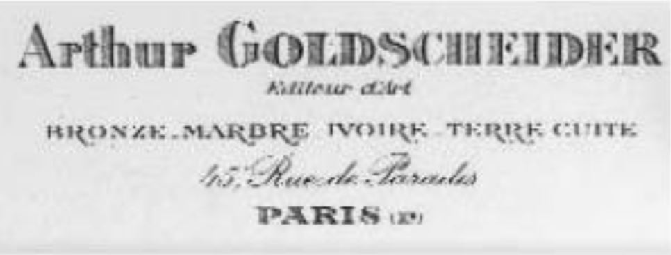 Visitenkarte Arthur Goldscheider, Éditeur d’Art, Paris.